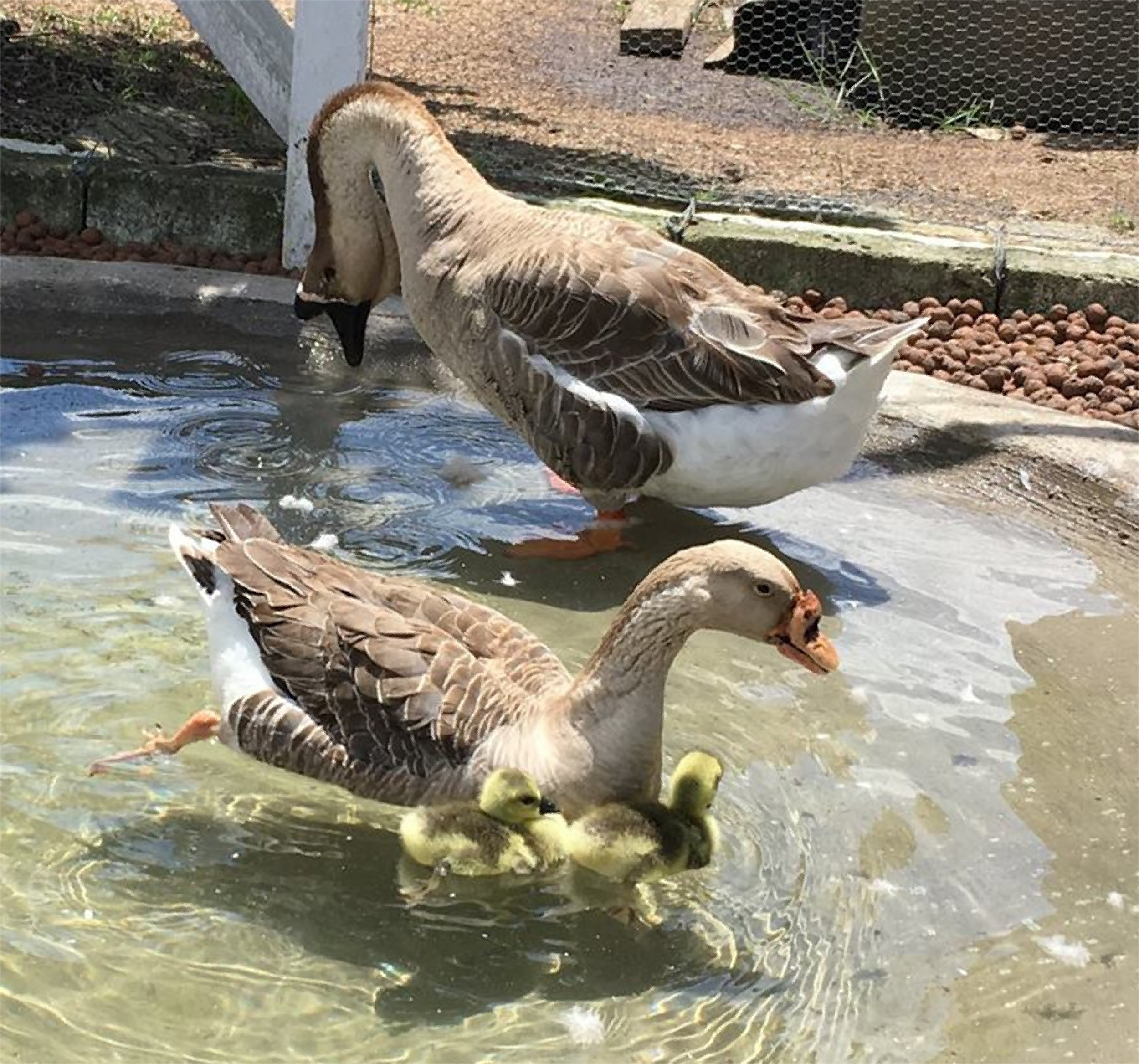 Gansa Vitória com os seus filhos e o seu companheiro, meses depois de receber as próteses de bico.